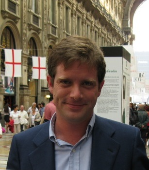 Ritaglio di File:Giuseppe Civati.JPG.jpg (Giuseppe Civati durante una manifestazione a favore di internet)